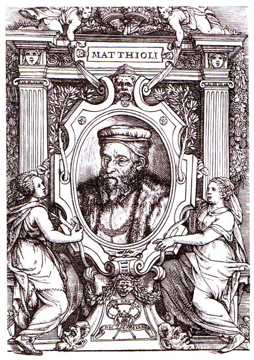 Pietro Andrea Mattioli, dřevořez určený původně pro Epistolarum Medicinalium libri quinque druhotně použitý roku 1586 druhotně použitý při tisku herbáře